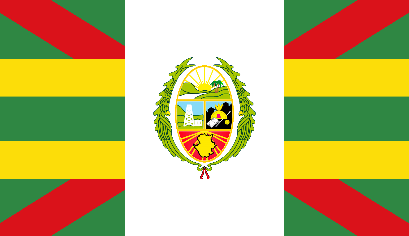 La Convención, Cusco